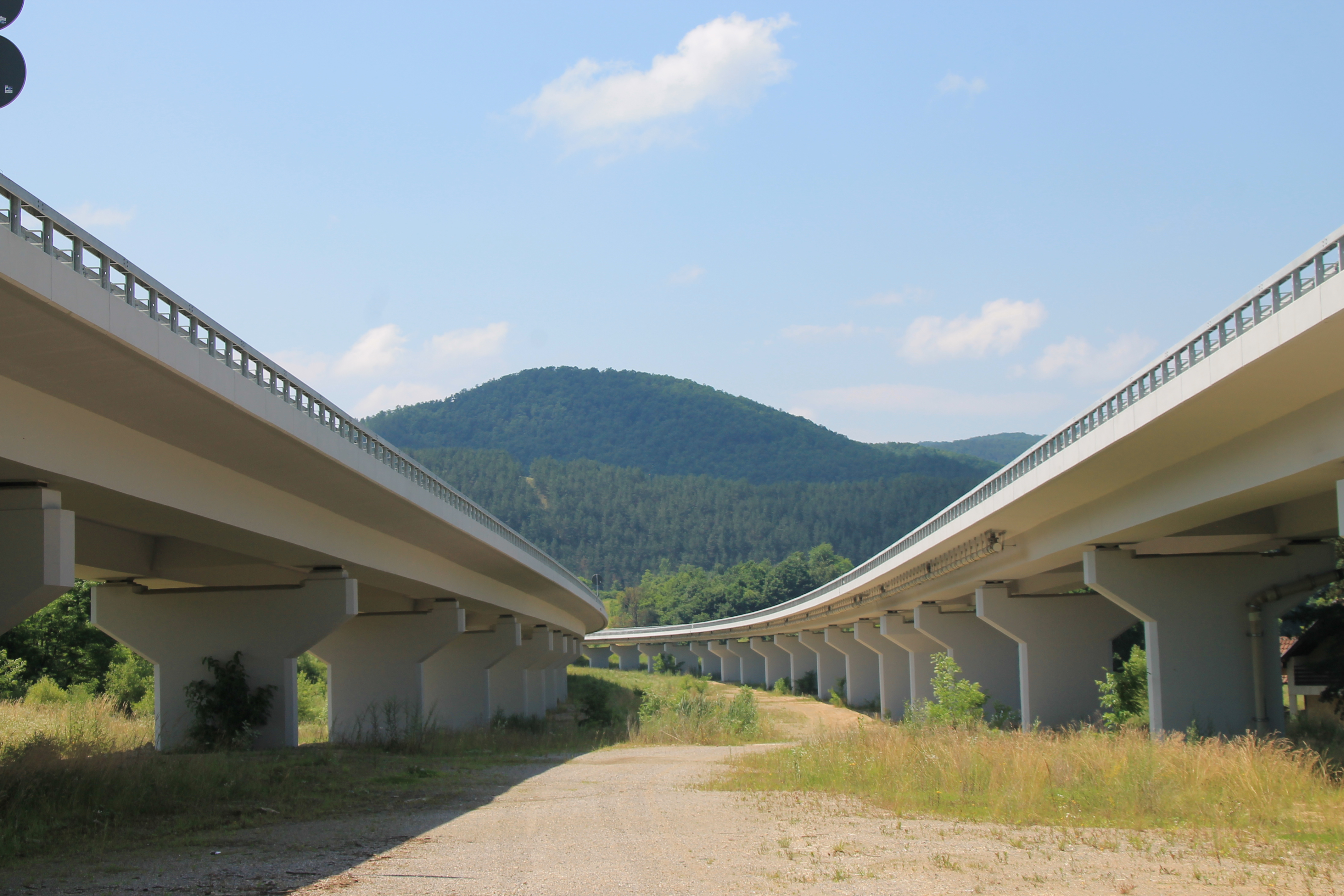 Šarani (Gornji Milanovac)